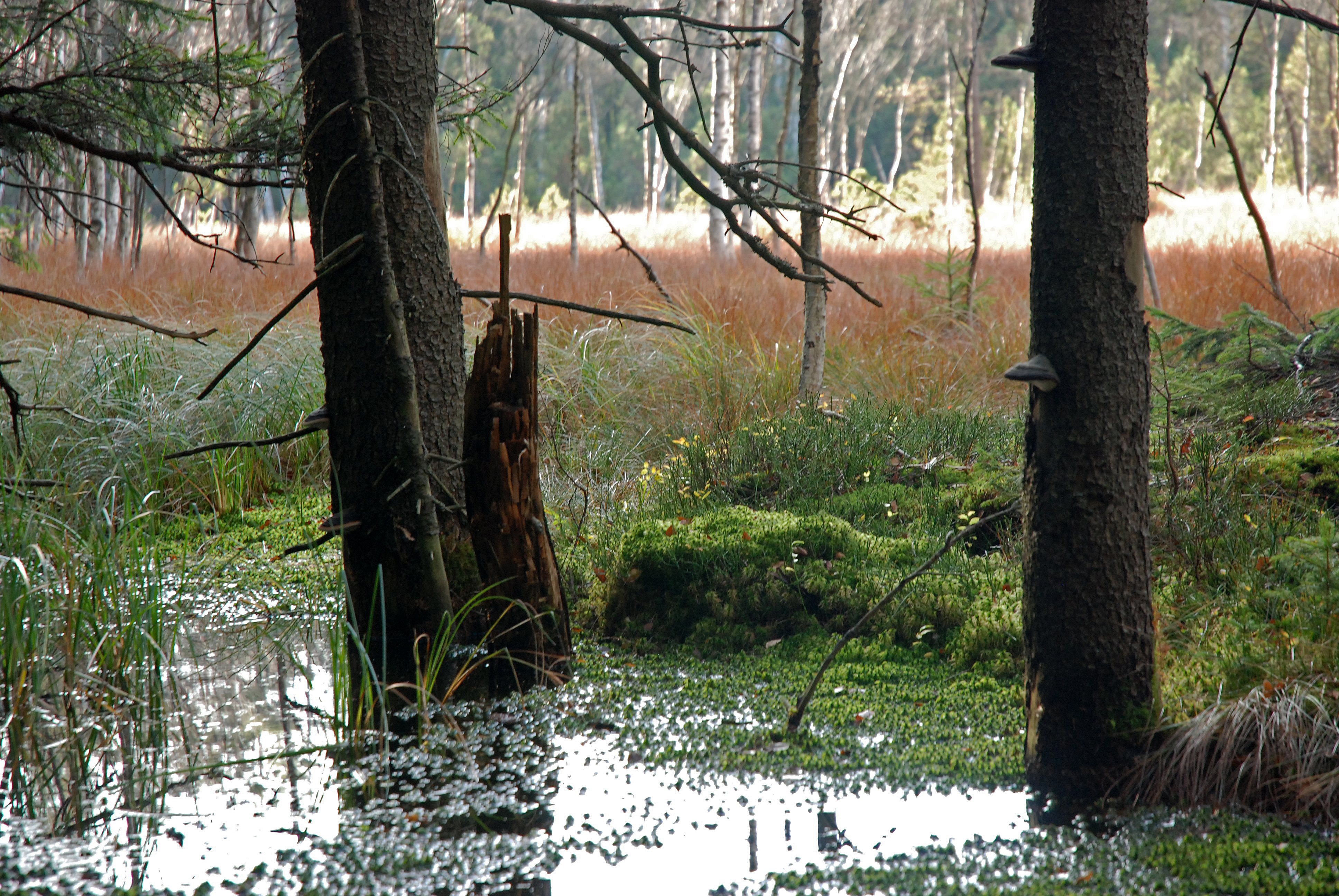 Naturschutzgebiet Torfowisko pod Zieleńcem (früher "Reinerzer Seefelder" oder "Die Seefelder"), Habelschwerdter Gebirge (Góry Bystrzyckie), Niederschlesien, Polen.